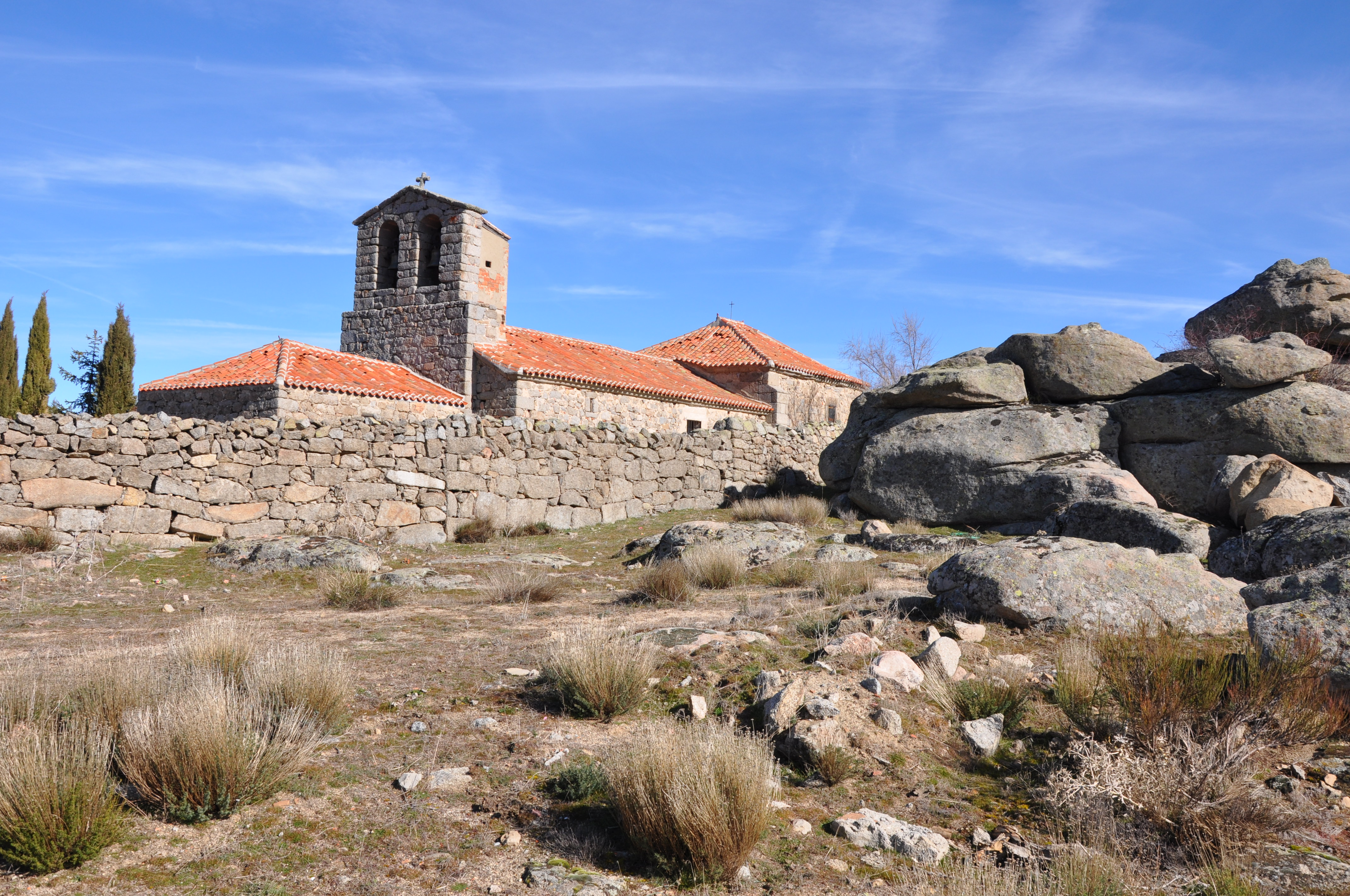 Iglesia de la Asunción en Gallegos de Altamiros, Ávila, España